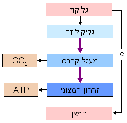 תרשים מופשט של נשימה אווירנית